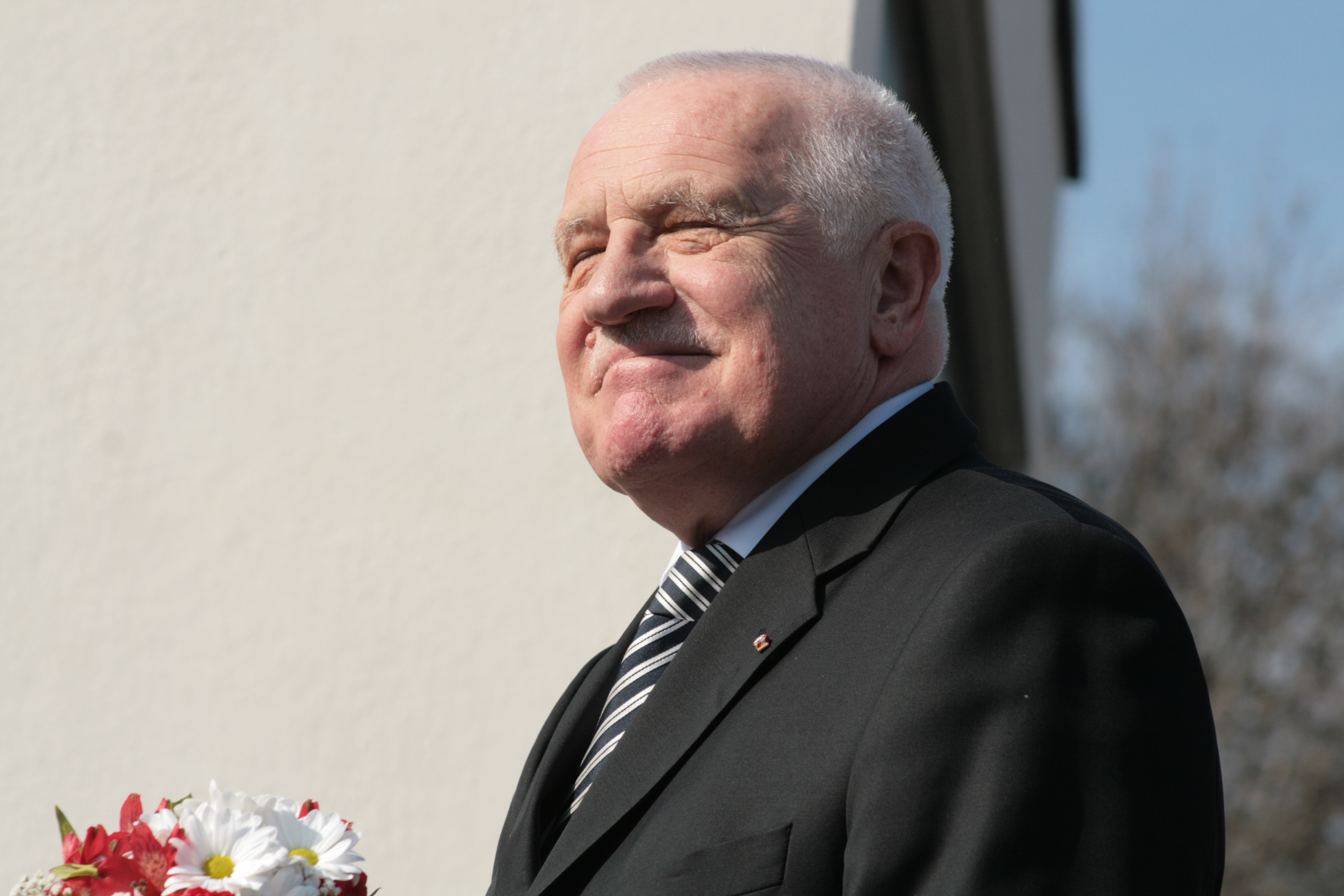 Dosluhující český prezident Václav Klaus a slovenský prezident Ivan Gašparovič se ve středu 6. března 2013 setkali ve vile Tugendhat v Brně, aby si vzájemně předali státní vyznamenání - Řád bílého lva 1. třídy a Řád bílého dvojkříže 1. třídy. ČTK: Prezidenti ČR a Slovenska si předali nejvyšší státní vyznamenání CTK: Czech and Slovak presidents present each other with state decorations